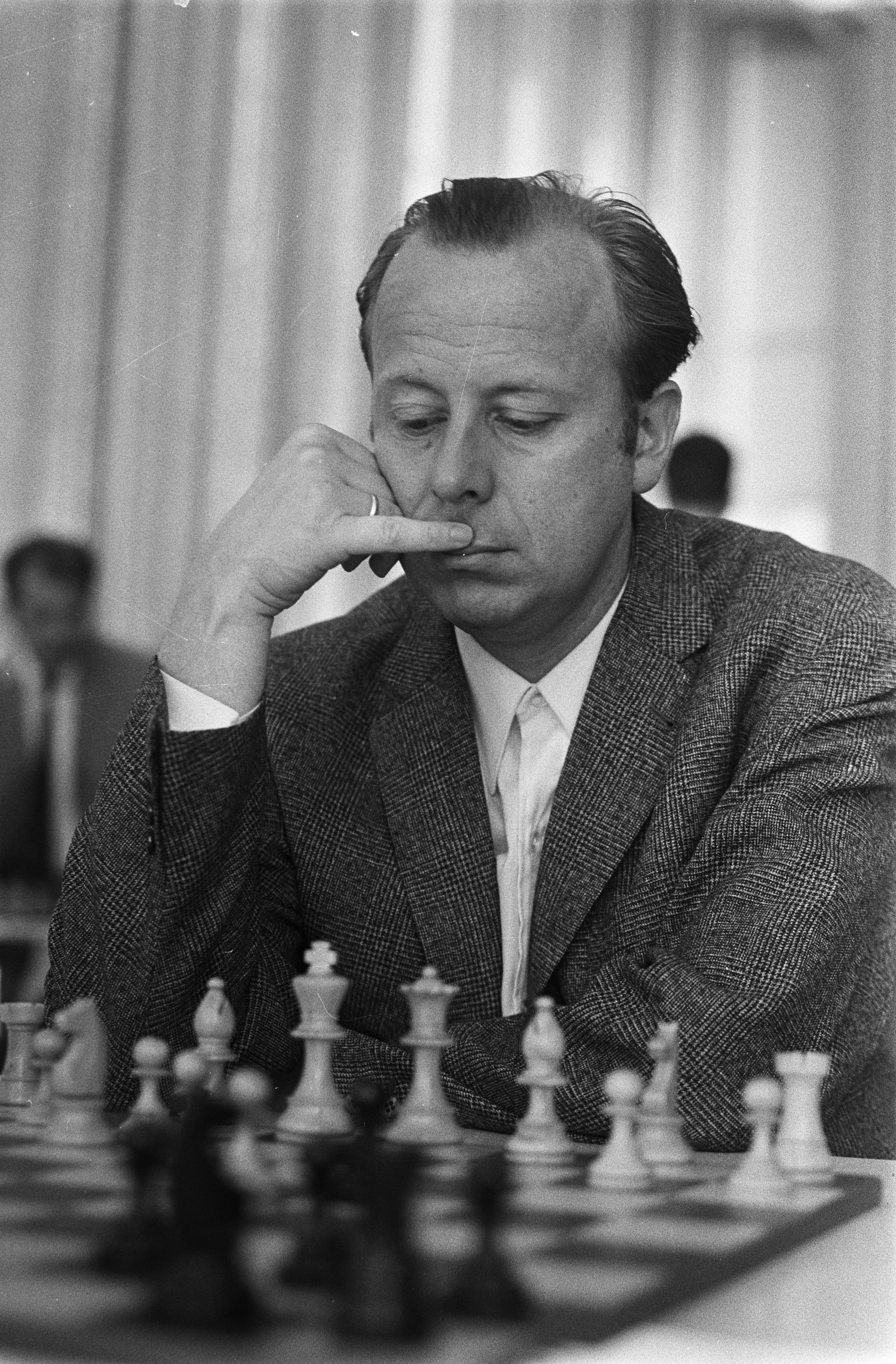 Collectie / Archief : Fotocollectie Anefo Reportage / Serie : [ onbekend ] Beschrijving : IBM-schaaktoernooi; W. Uhlmann (kop) in aktie, nr. 13a: Donner (kop) in aktie Datum : 22 juli 1970 Trefwoorden : schaken Persoonsnaam : W. Uhlmann Instellingsnaam : IBM-Schaaktoernooi Fotograaf : Mieremet, Rob / Anefo Auteursrechthebbende : Nationaal Archief Materiaalsoort : Negatief (zwart/wit) Nummer archiefinventaris : bekijk toegang 2.24.01.05 Bestanddeelnummer : 923-6892